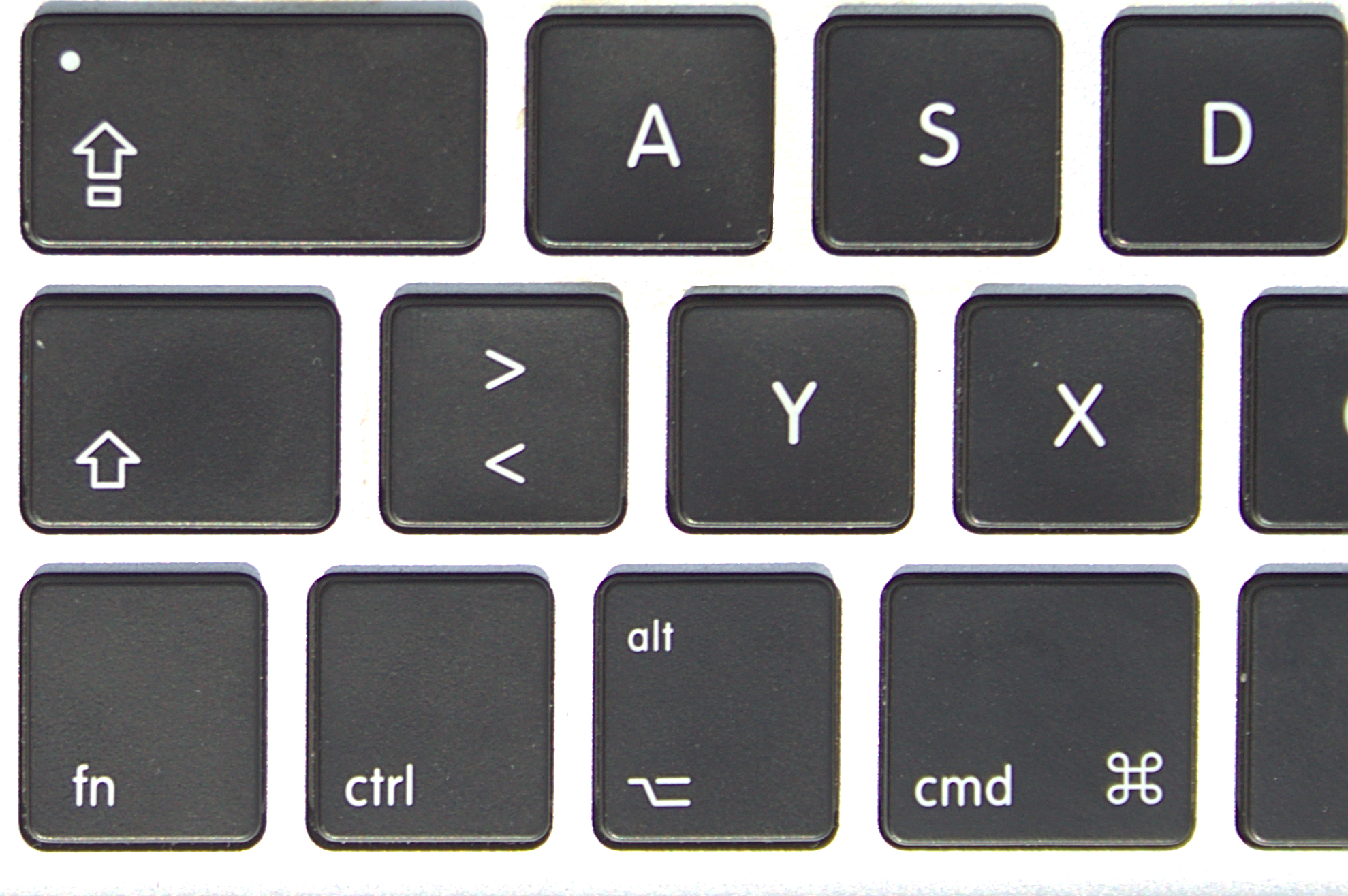 La modifaj klavoj sur la maldekstra flanko de klavaro de mez-2012-a 13-cola MacBook Air kun QWERTZ-aranĝo